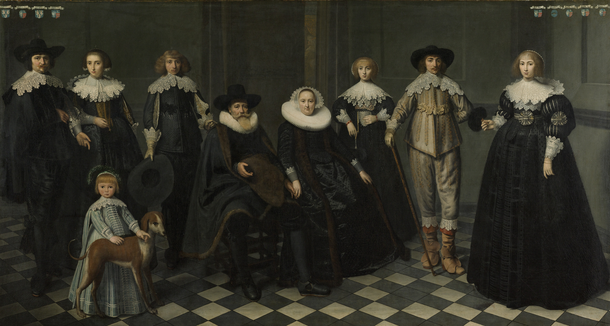 Familieportret van het gezin van Dirck Bas Jacobsz, burgemeester van Amsterdam. In het midden zit Dirck Bas Jacobsz (1569-1637) met zijn tweede echtgenote Margriet Snoeck (1588-1645). De kinderen zijn staand ten voeten uit voorgesteld (van links naar rechts): Machteld Bas (gest. 1681) met haar man Abraham de Visscher (1605-1667) en hun zoontje met een hond, Jacob Bas Dircksz (1609-1656), Agatha Bas (1611-1658), Claes Bas (1616-1635) en Lysbeth Bas (1619-1680). Rechts- en linksboven staan de familiewapens met namen.